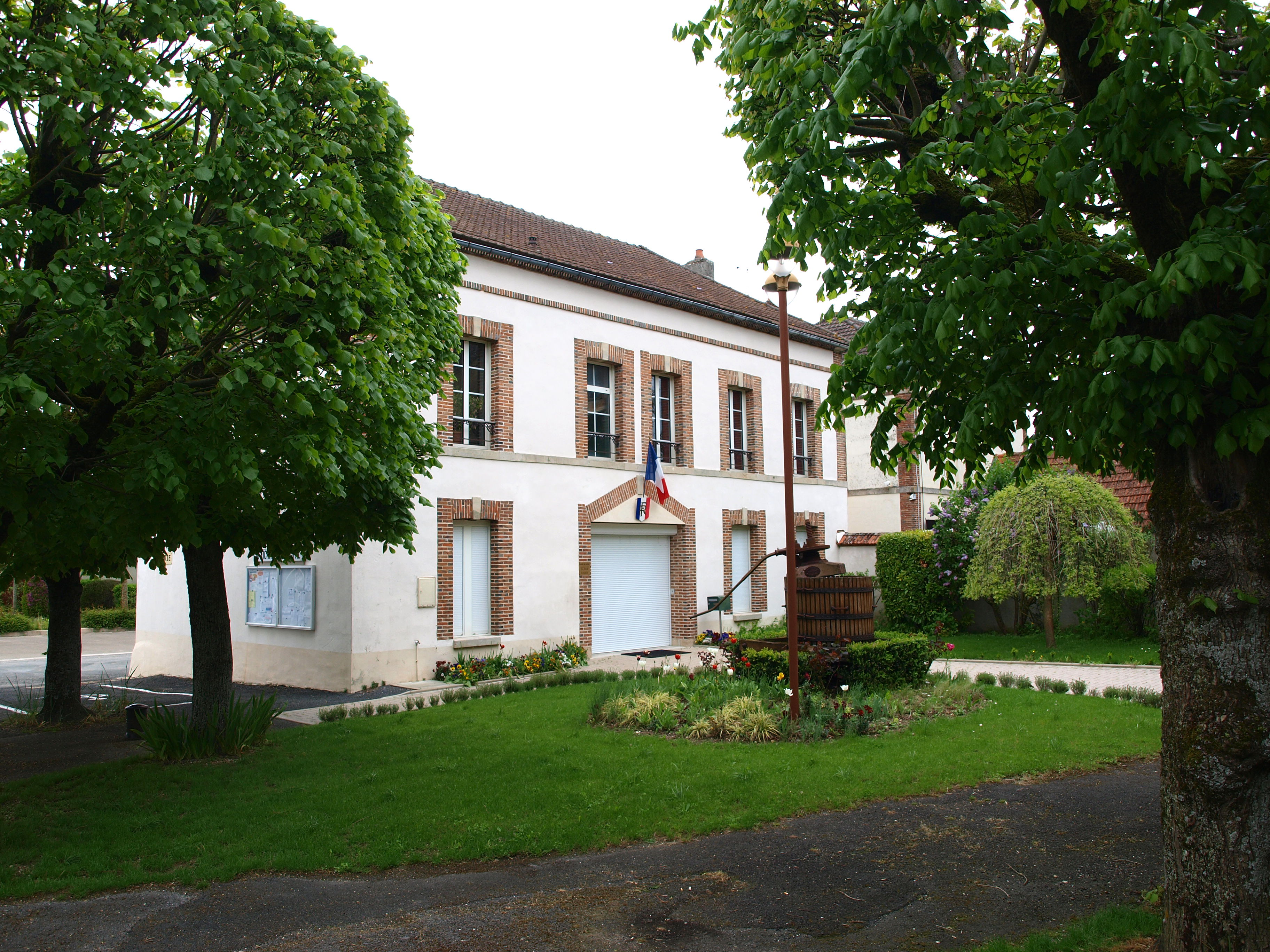 Saudoy (Marne, France) , mairie.